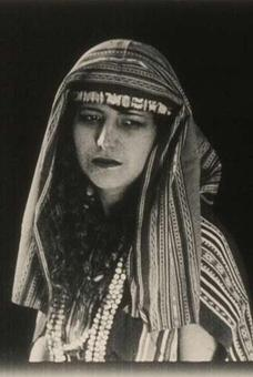 Wara Wara